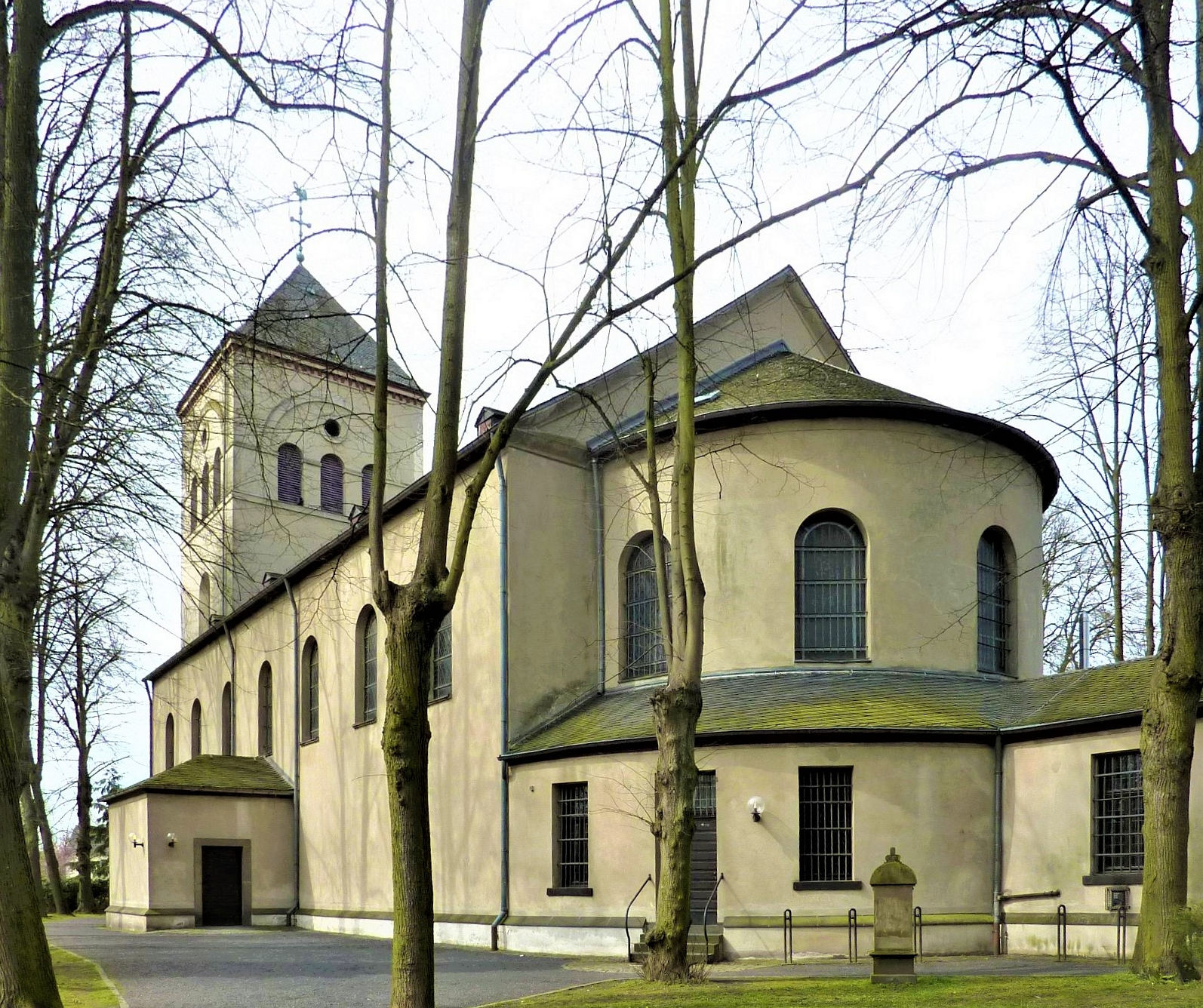 St. Gereon, Köln-MerheimMerheim